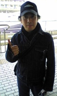 二井原実in新横浜駅